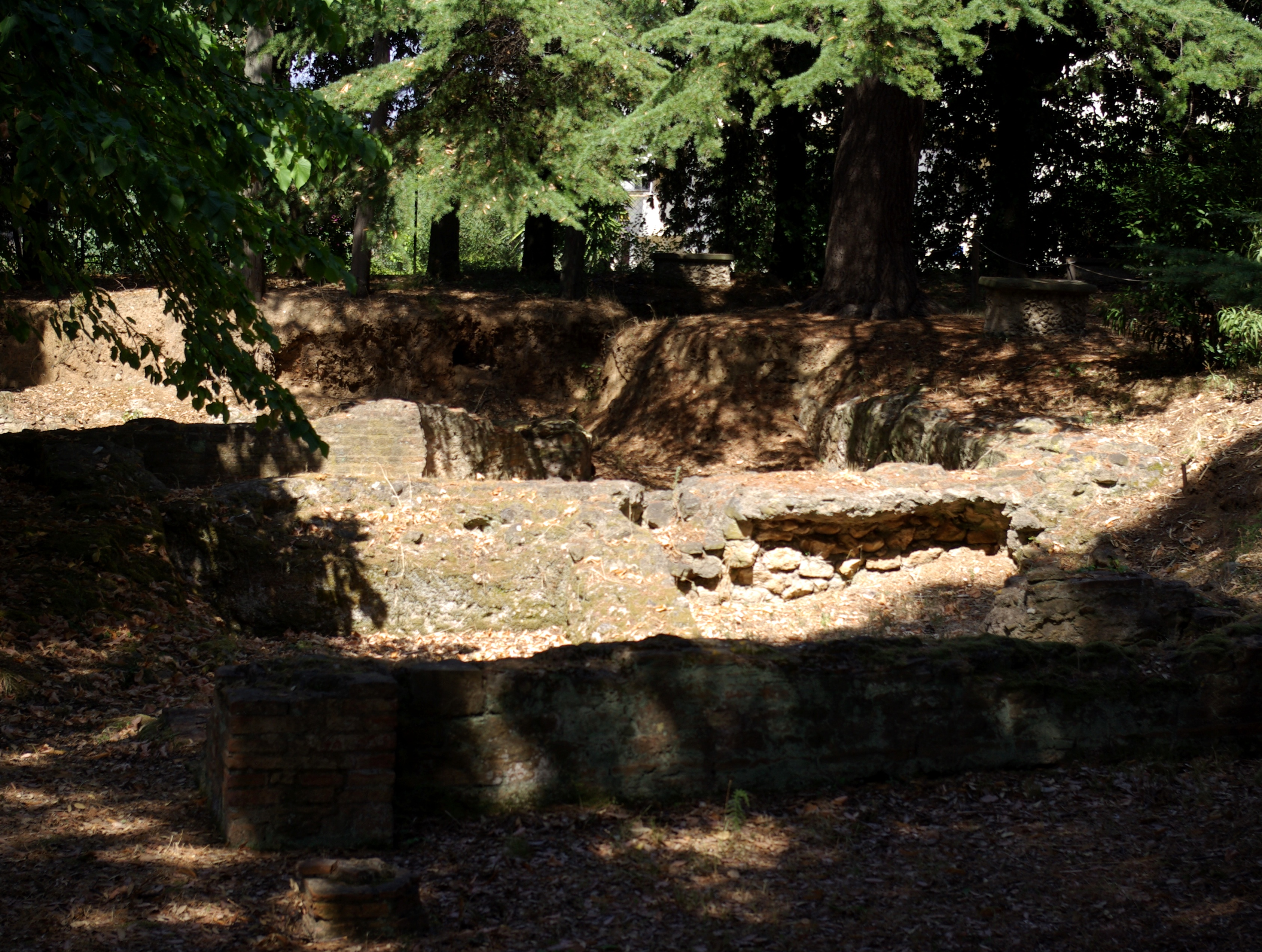 Ausgrabungen einer römischen Villa im Archäologischen Park von Cecina